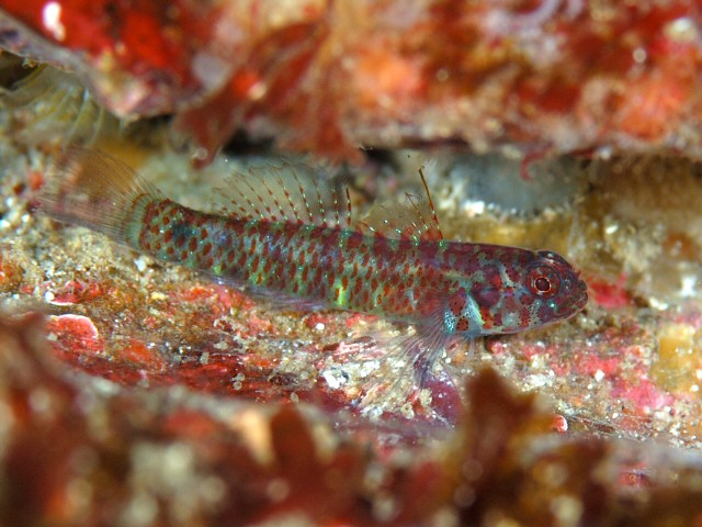 ナンヨウミドリハゼ Eviota prasina